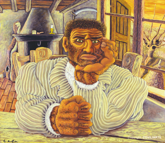 cm 70 x 80